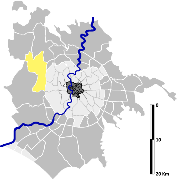 Casalotti